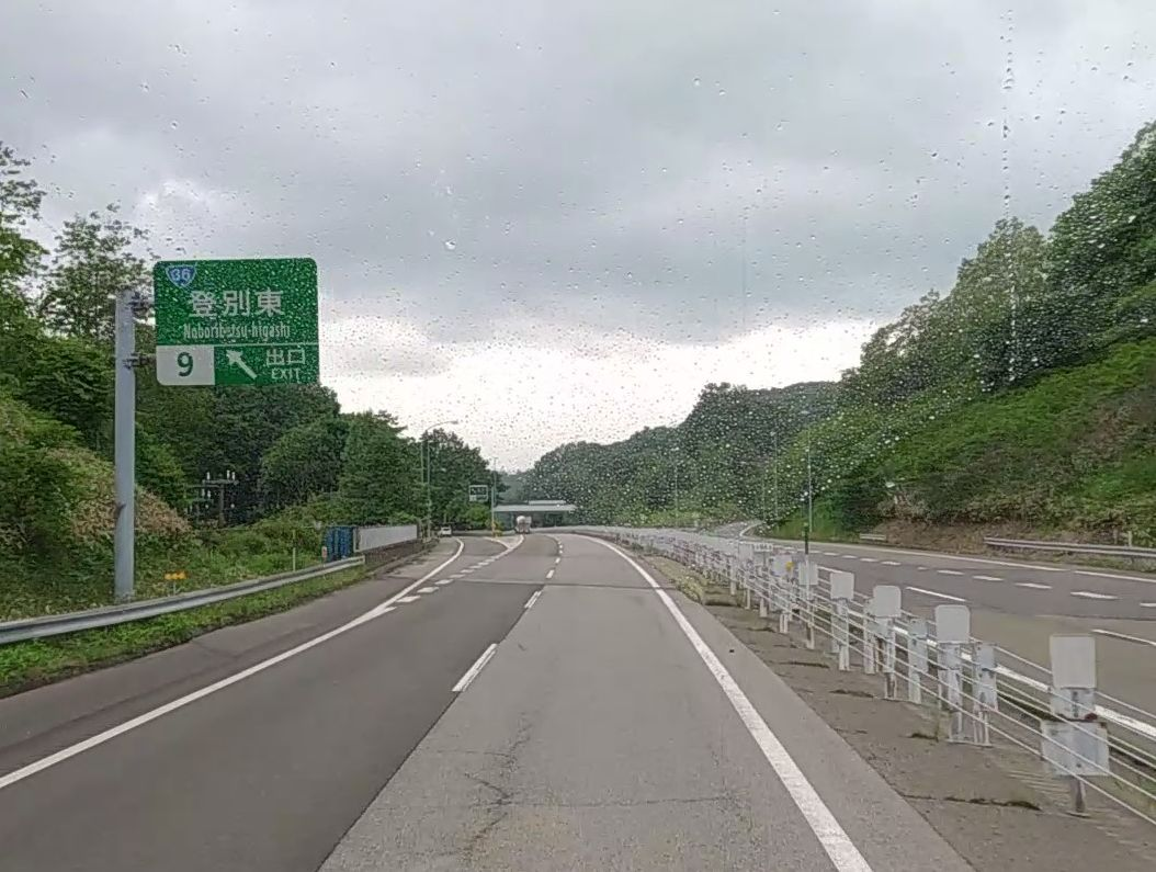 登別東インターチェンジ出口（上り線（函館方向）、2018年7月撮影）